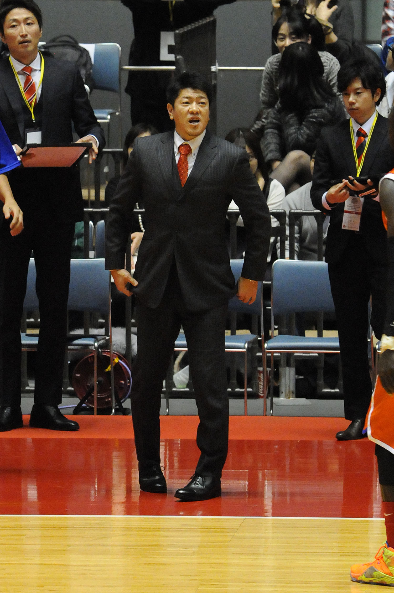 広島ドラゴンフライズ、佐古賢一HC。代々木第一体育館で。